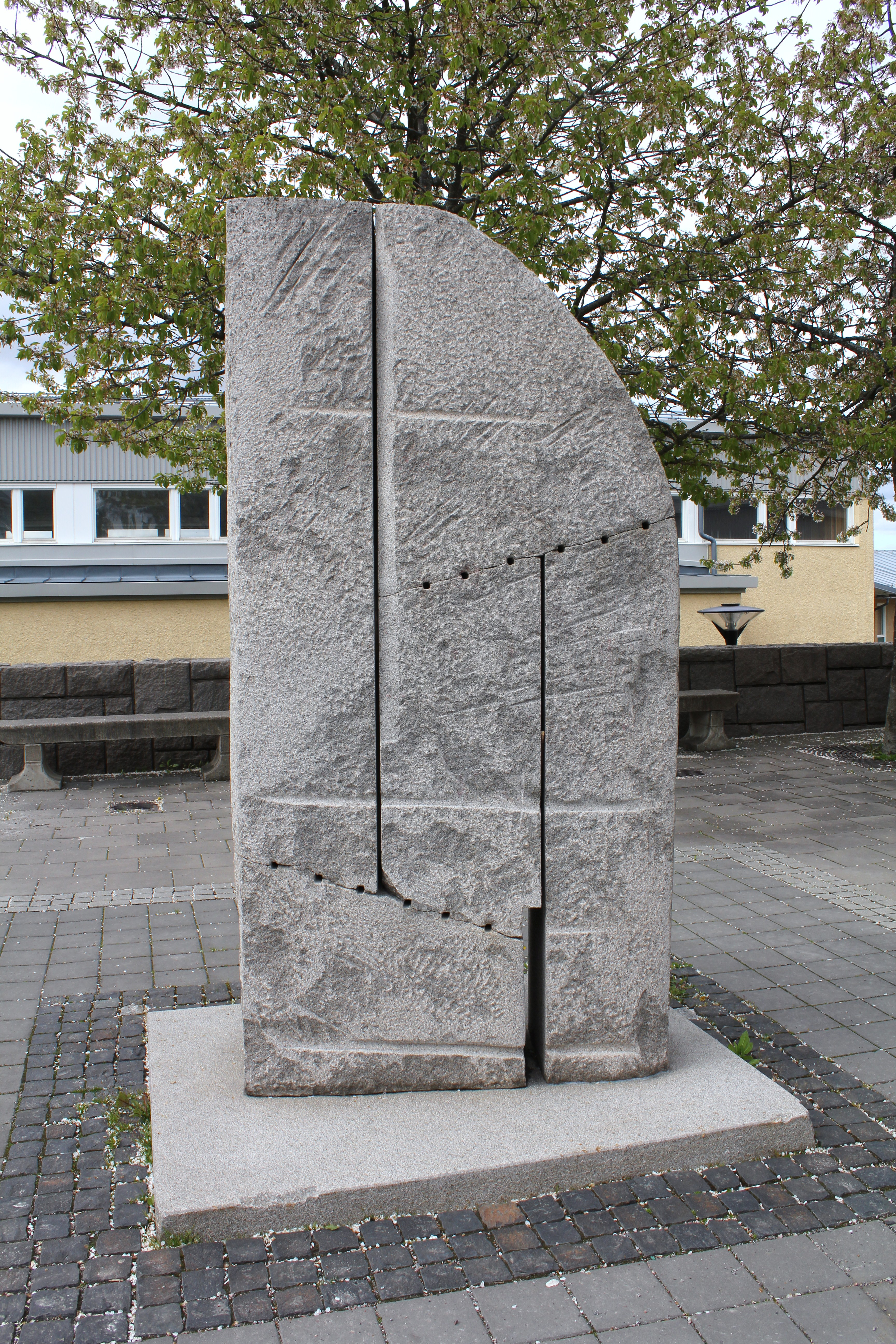 Skulpturen "Fragment ur naturens arkitektur I-V" av Irene Vestman på Östbergatorget i Östbergahöjden.